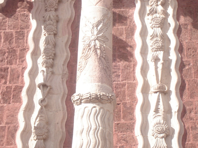 simbolos de la catedral de Querétaro